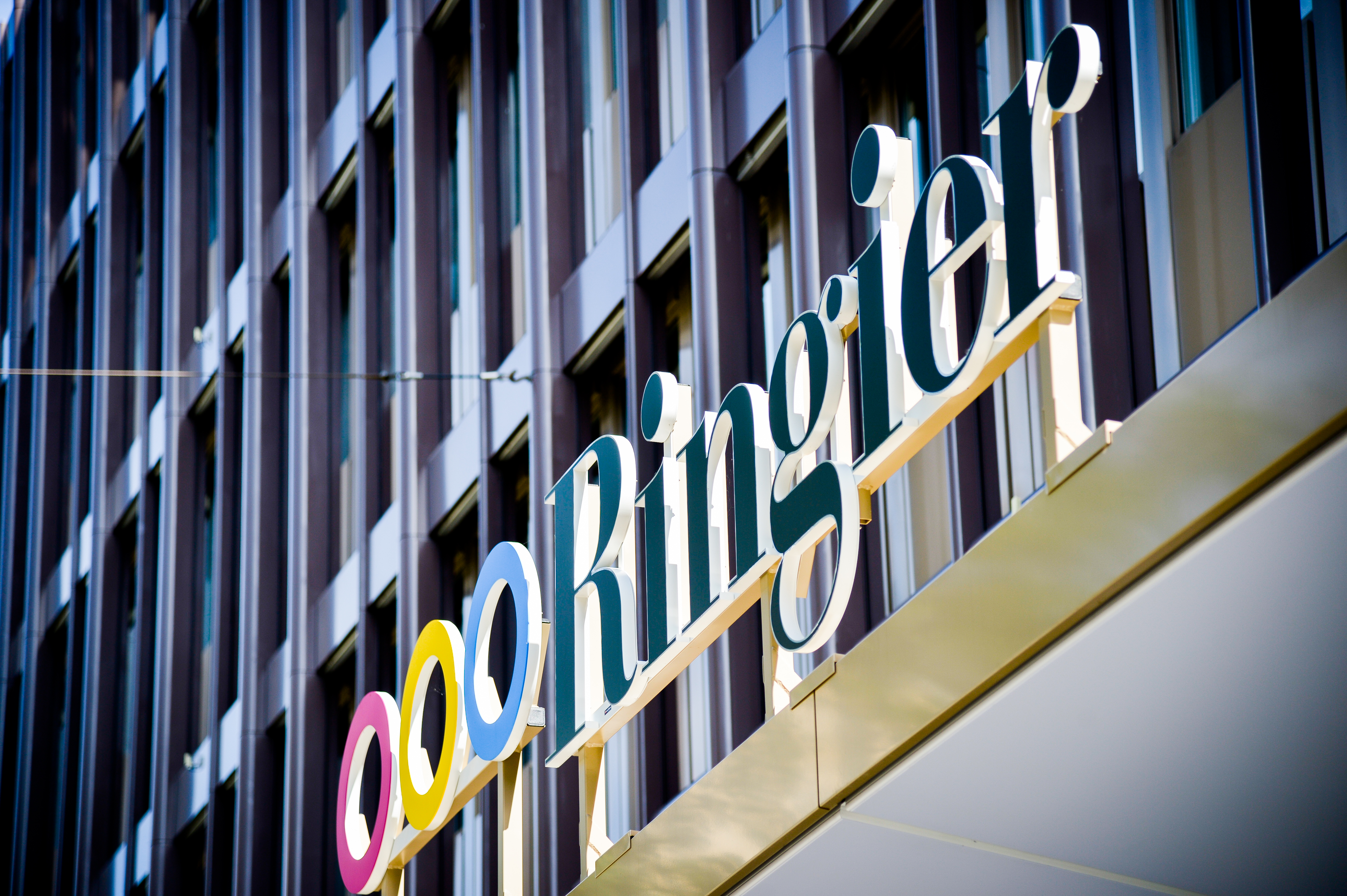 Haupteingang Ringier Pressehaus, Dufourstrasse 23, Zürich